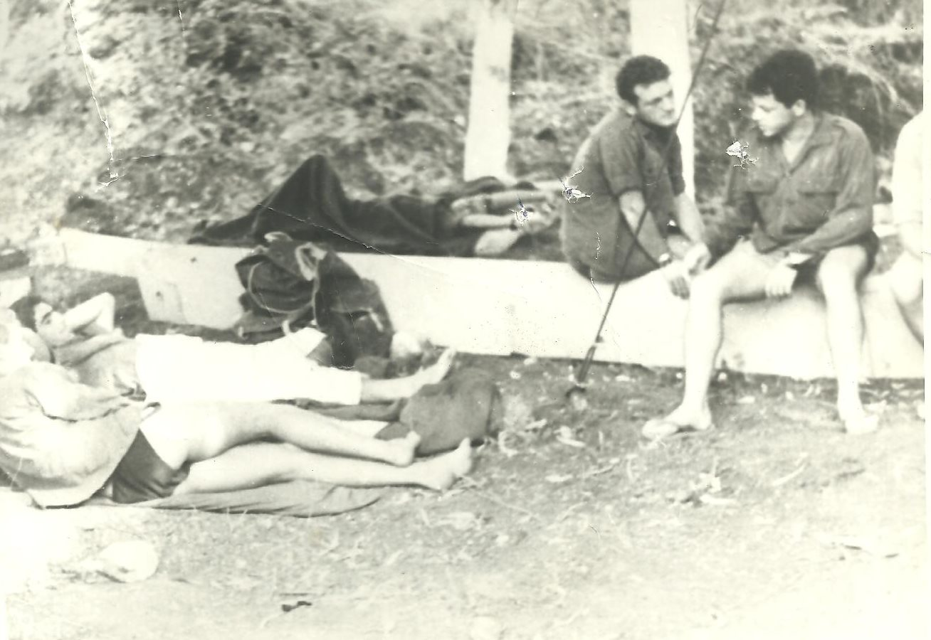 כח שייטת 13 שעסק בחילוץ ספינת המשמר בכנרת במנוחה בחורשת גנוסר.